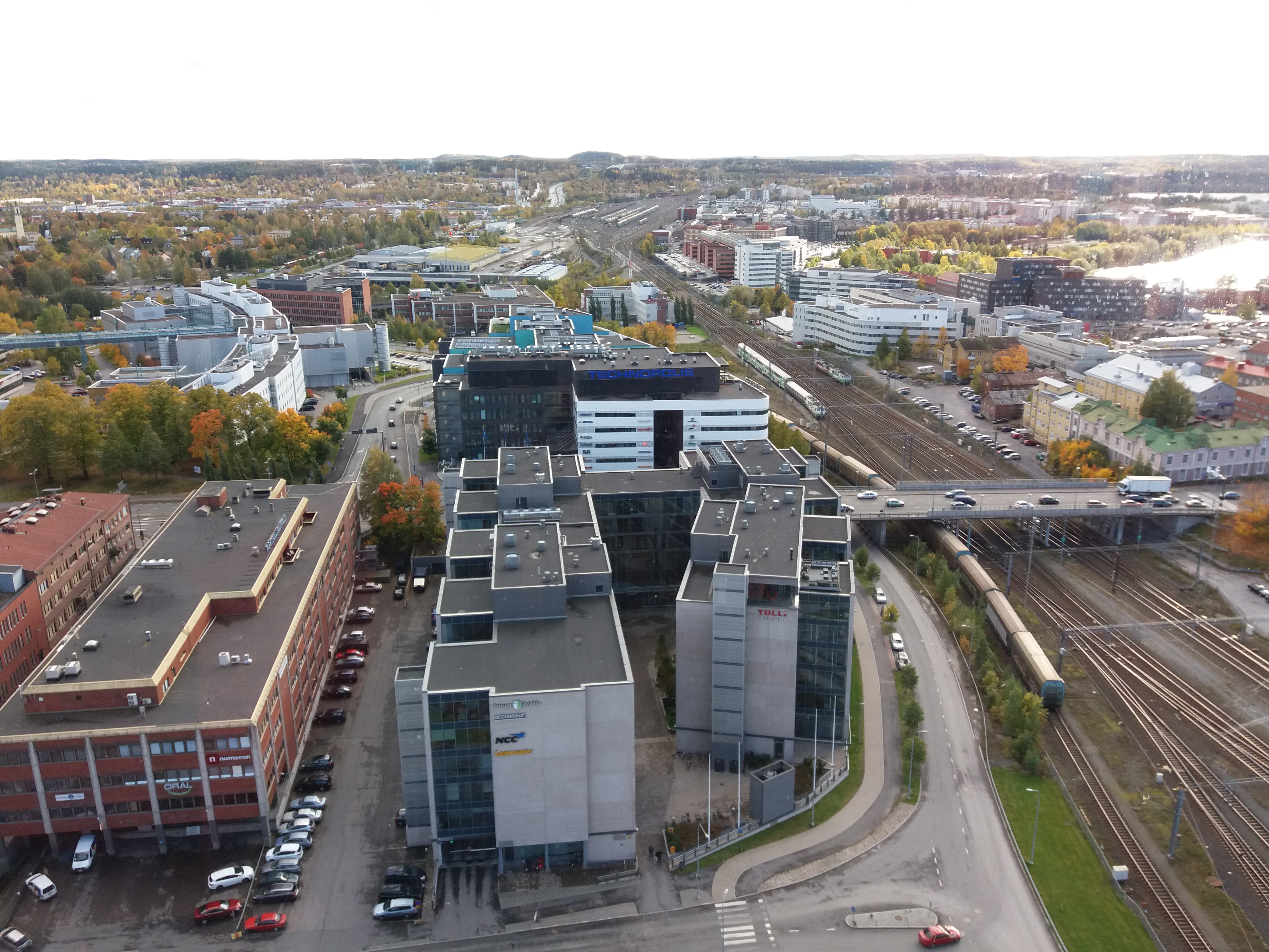 Tullipark